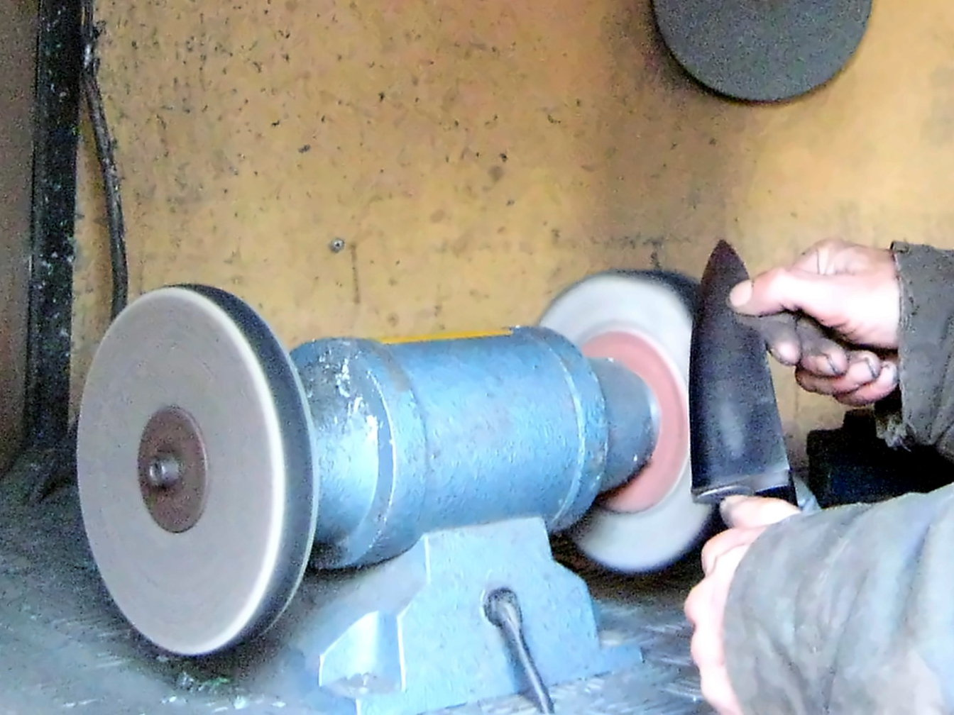 Scherenschleifer Jürgen Schneider beim Polieren eines nachgeschärften Kochmessers an einer Polierscheibe – an einer elektrisch betriebenen Poliermaschine in einem Werkstattanhänger der Mobilen Scherenschleiferei – Familienschleiferei R. Rose, die hier in Bremen-Osterholz Station macht.